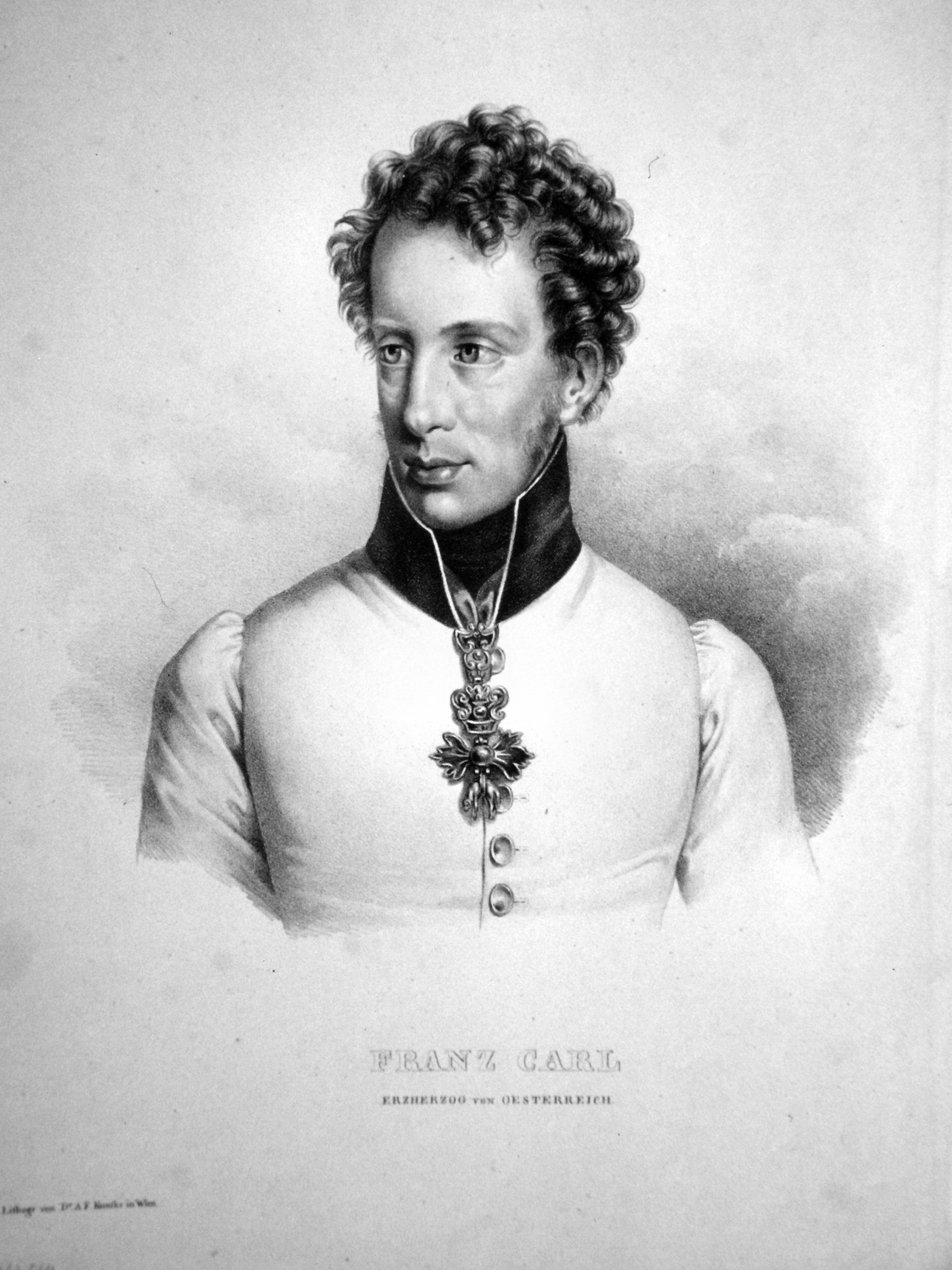 Franz Karl von Österreich (1902-1878), Erzherzog, Vater des Kaisers Franz Joseph